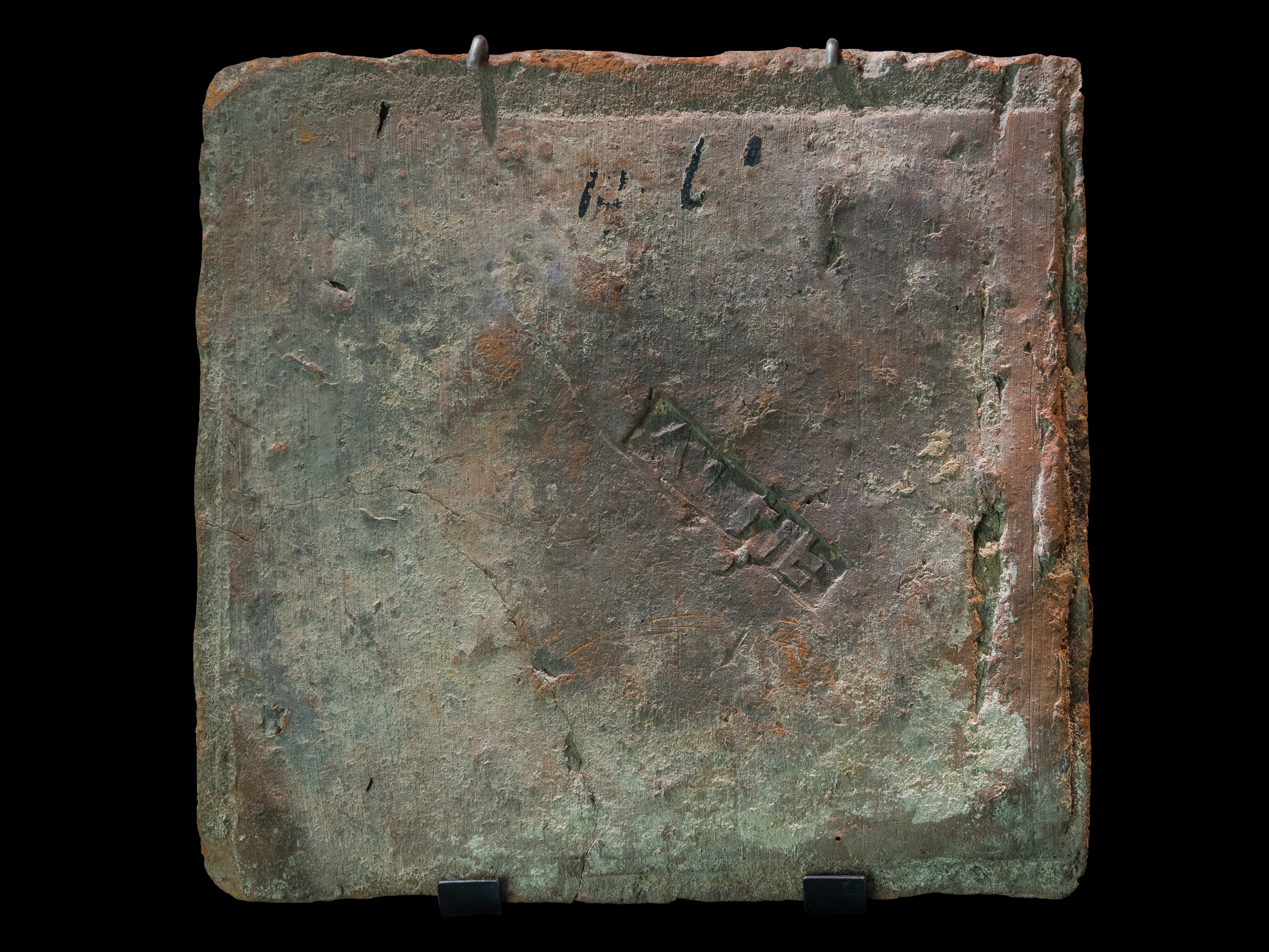 Römisches Reiterkastell Aalen, Flachziegel mit Ziegelstempel der Ala II Flavia pia fidelis milliaria, ausgestellt im Württembergischen Landesmuseum in Stuttgart.